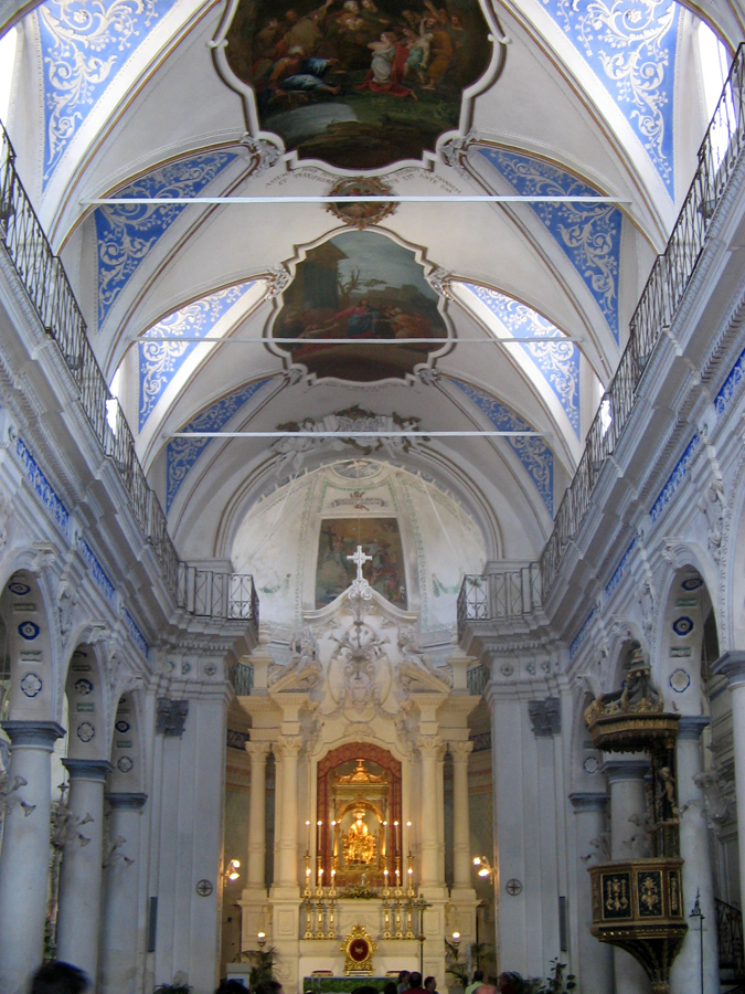 Giarratana (RG) - Chiesa di S. Bartolomeo, interno - Foto D. Pennisi